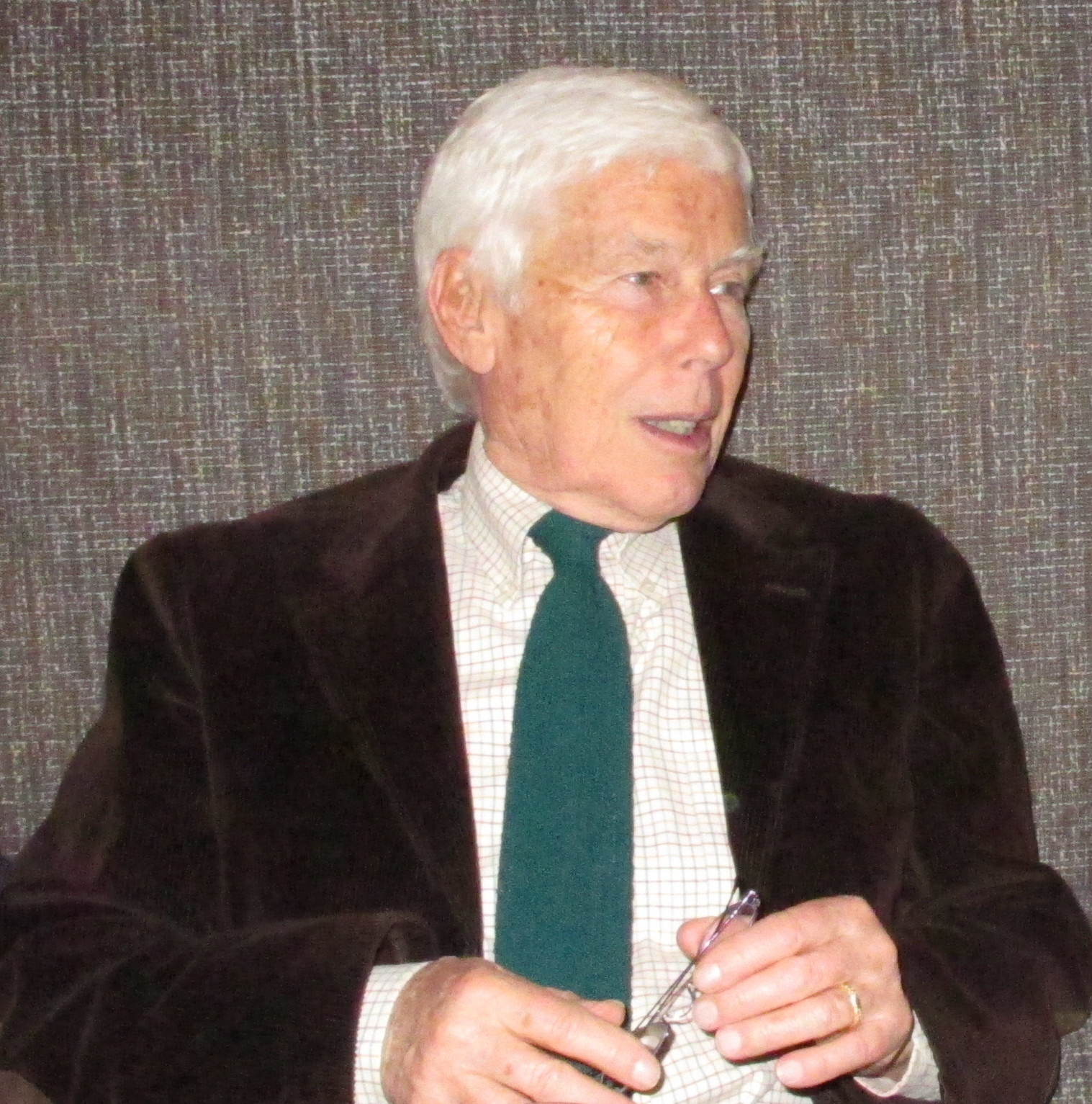 Beppe Bigazzi nel 2010